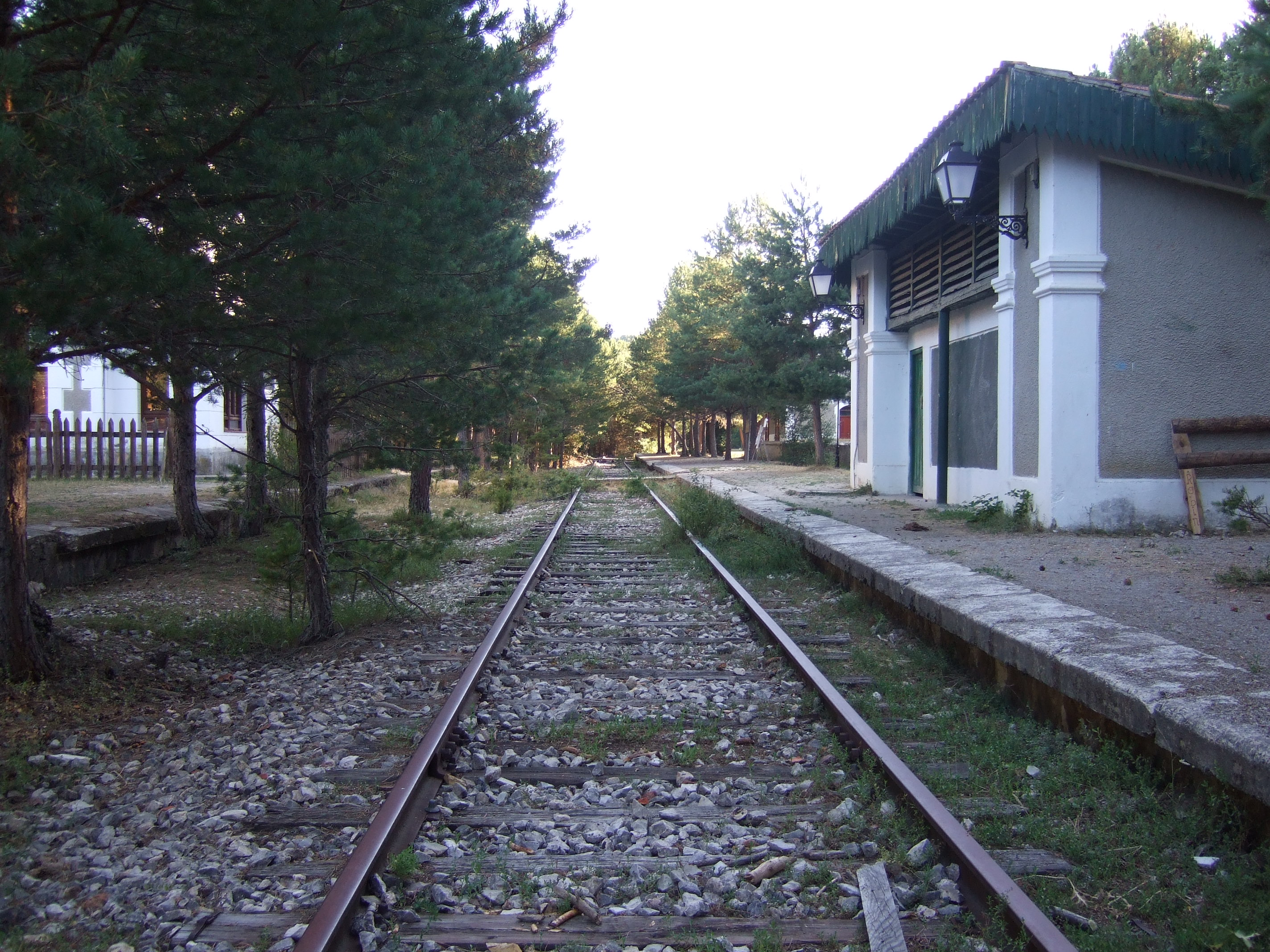 Estación(Rail Station)_Navaleno_Soria_Spain